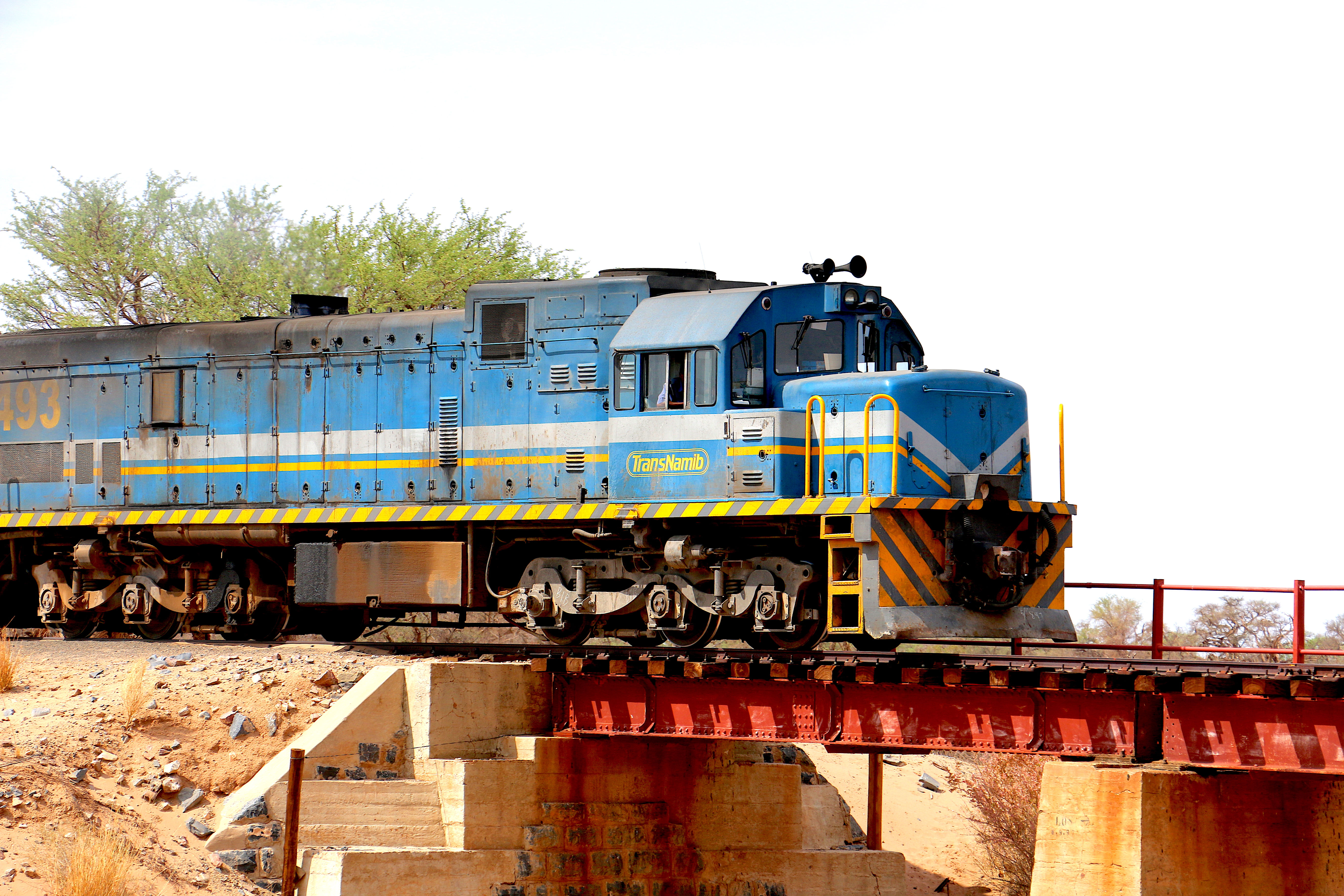 Diesellokomotive bei Simplon auf der Brücke über den Gurieb (Namibia, 2015)